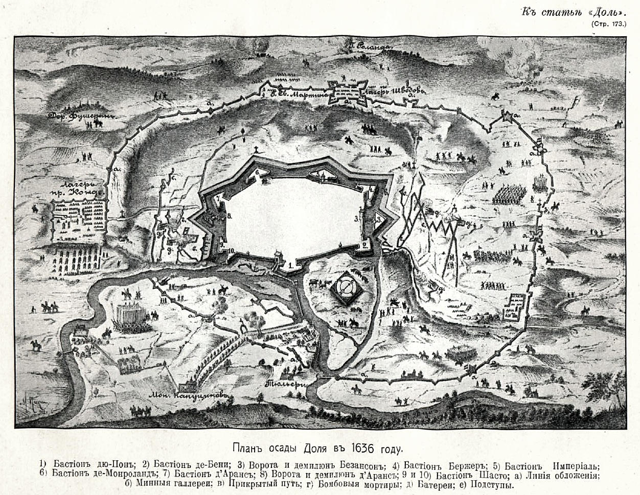 План осады Доля в 1636 году. 1) Бастион дю-Пон; 2) Бастион де-Бени; 3) Ворота и демилюн Безансон; 4) Бастион Бержер; 5) Бастион Империал; 6) Бастион де-Монроланд; 7) Бастион д’Аранс; 8) Ворота и демилюн д’Аранс; 9 и 10) Бастион Шасто; а) Линия обложения; б) Минные галлереи; в) Прикрытый путь; г) Бомбовые мортиры; д) Батереи; е) Подступы. Это изображение было использовано для иллюстрирования статьи «Доль» опубликованной в девятом томе «Военной энциклопедии», который был издан книгоиздательским товариществом И. Д. Сытина в 1912 году в столице Российской империи городе Санкт-Петербурге.